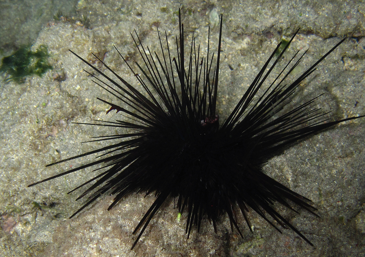 Des cténophores benthiques (peut-être Coeloplana bannwarthi) commensaux sur les piquants d'un oursin Diadema savignyi à la Réunion.